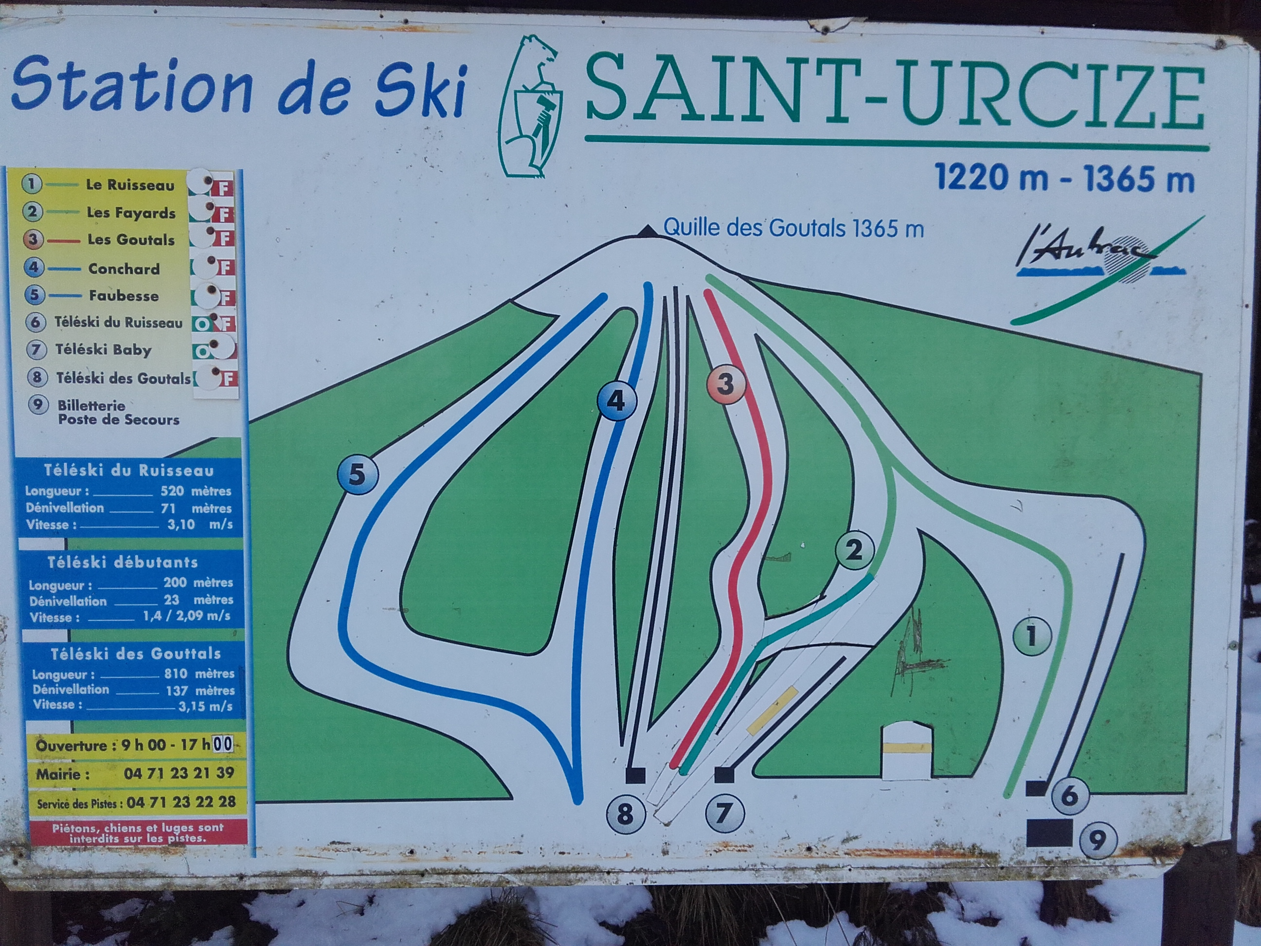 Plan de la station. Elle n’apparaît pas sur internet, elle fût prise à la station même.